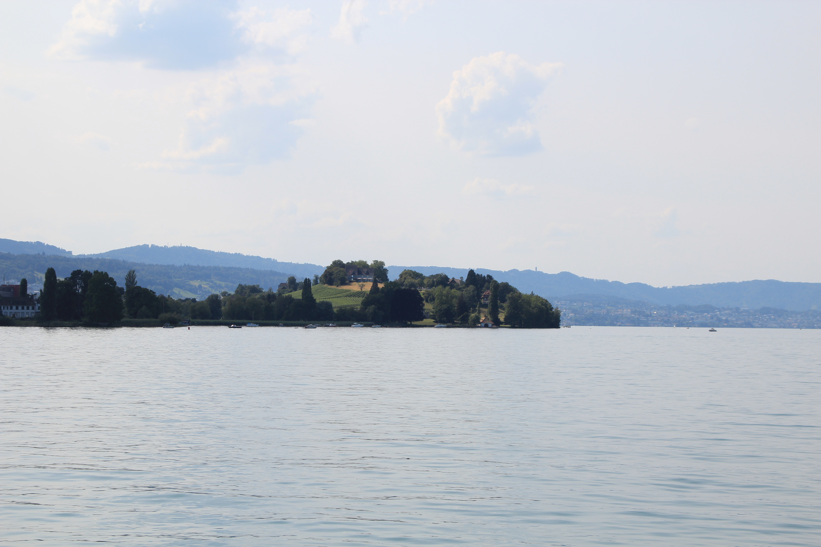 Halbinsel Au (Au peninsula) von Südosten